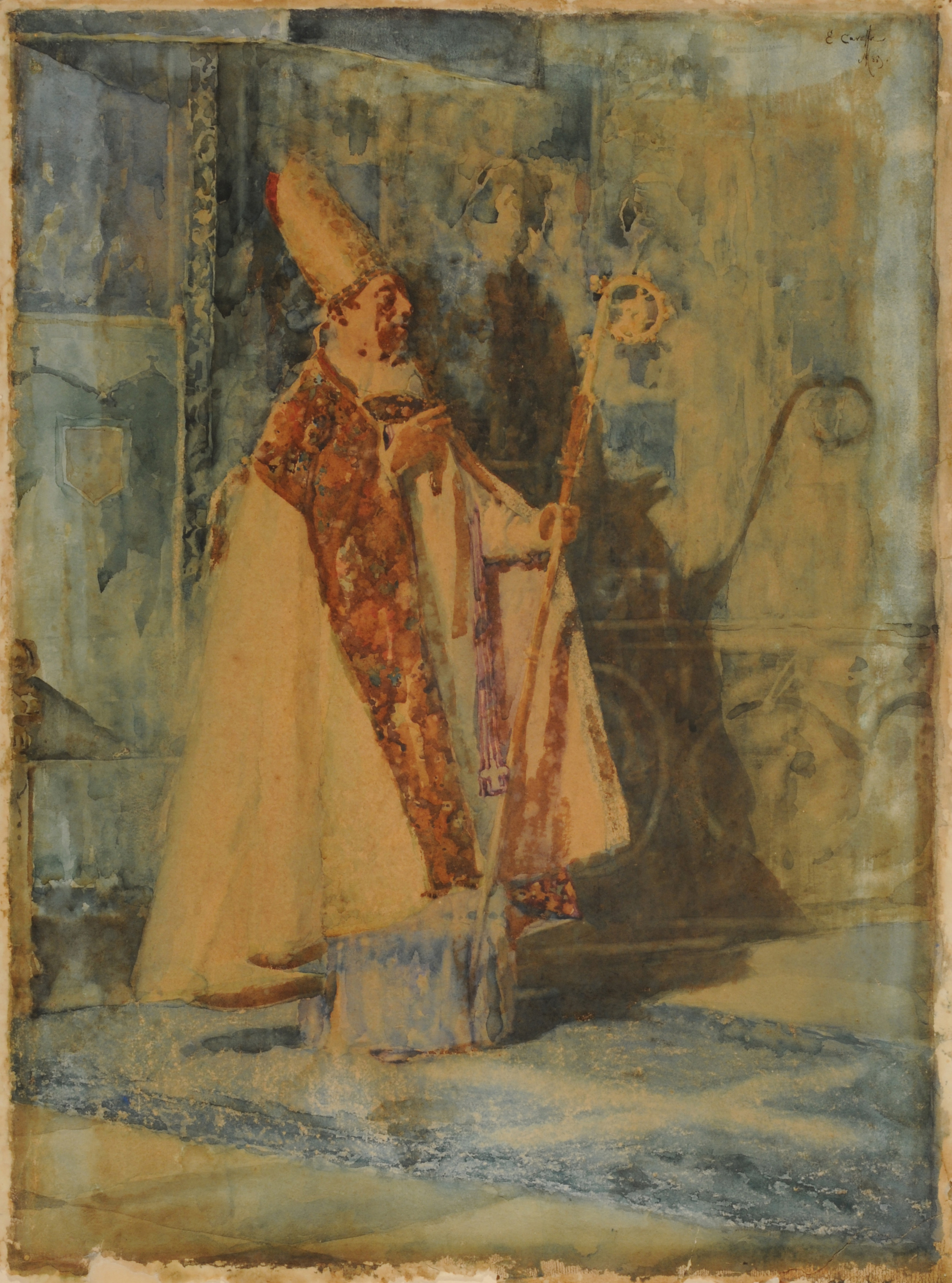 Emilio Caraffa, El Obispo. 1888. 61 x 45 cm, acuarela sobre papel. Inv. 5602.